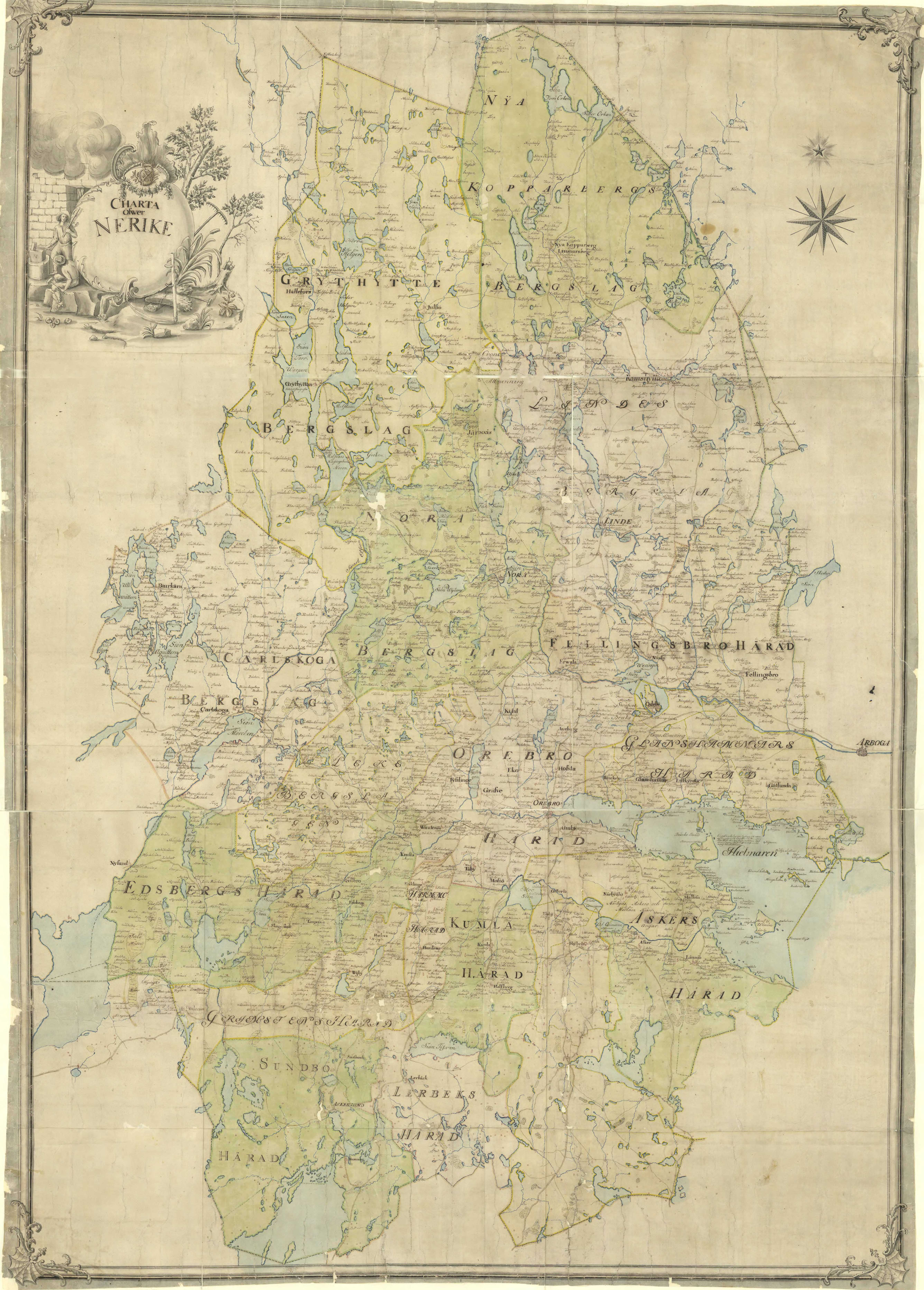 Gammal karta över Närke.